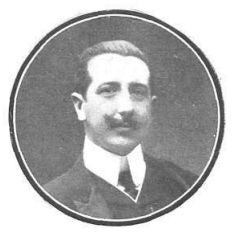 Retrato del Marqués de Quirós, obra de Christian Franzen, recogido en la revista española Actualidades.